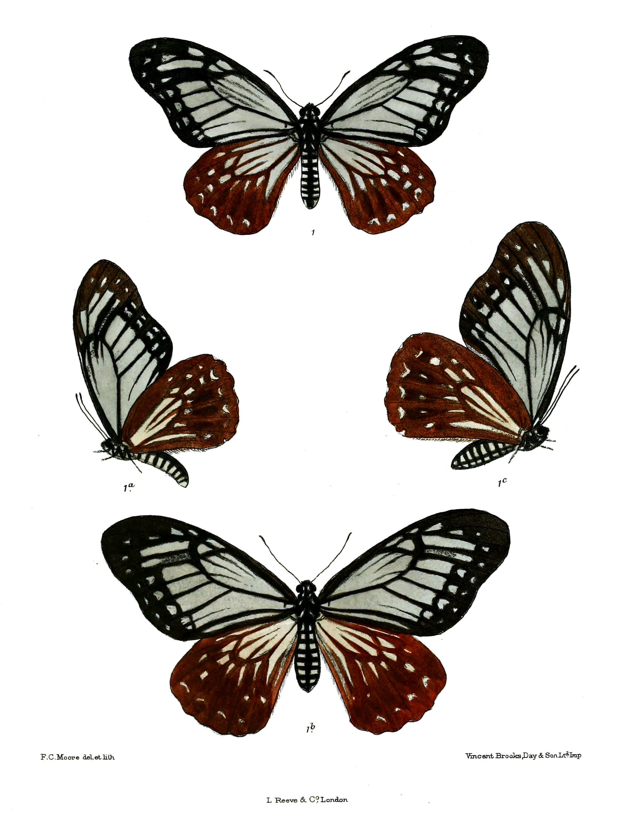 Cadugoides agestor = Papilio agestor